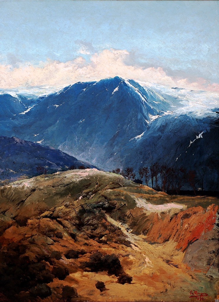 Ovidio Murguía Castro, (1871-1900): hijo de Rosalía de Castro y Manuel Murguía. Pintó el Guadarrama durante su estancia madrileña y bohemia en la última década del siglo XIX. Como el resto de los miembros de la "generación doliente", murió de tuberculosis en la flor de la vida.